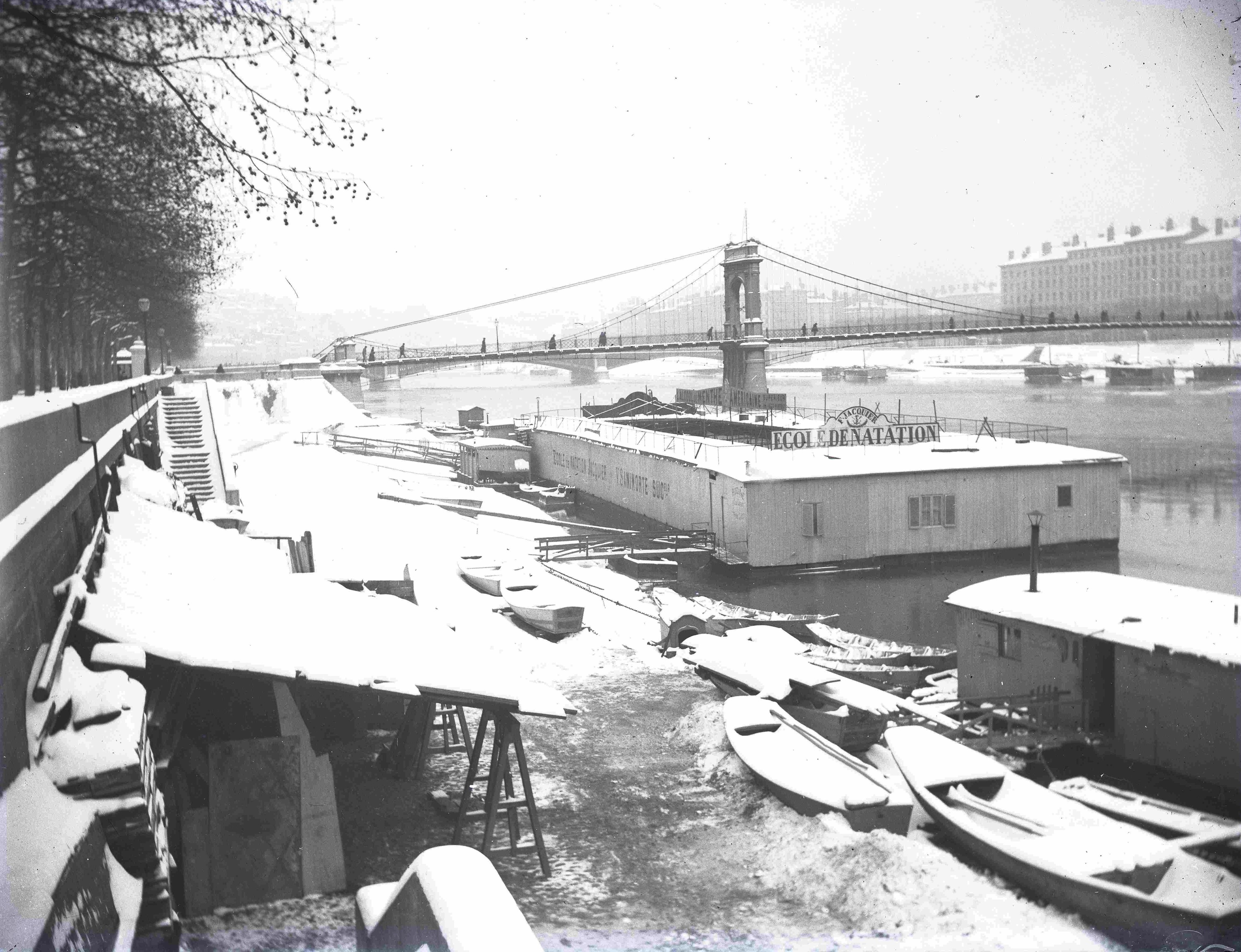 Lyon, l'école de natation Jacquier sous la neige. A l'arrière-plan, la passerelle du Collège et le Pont Morand. Sans doute avant 1900.